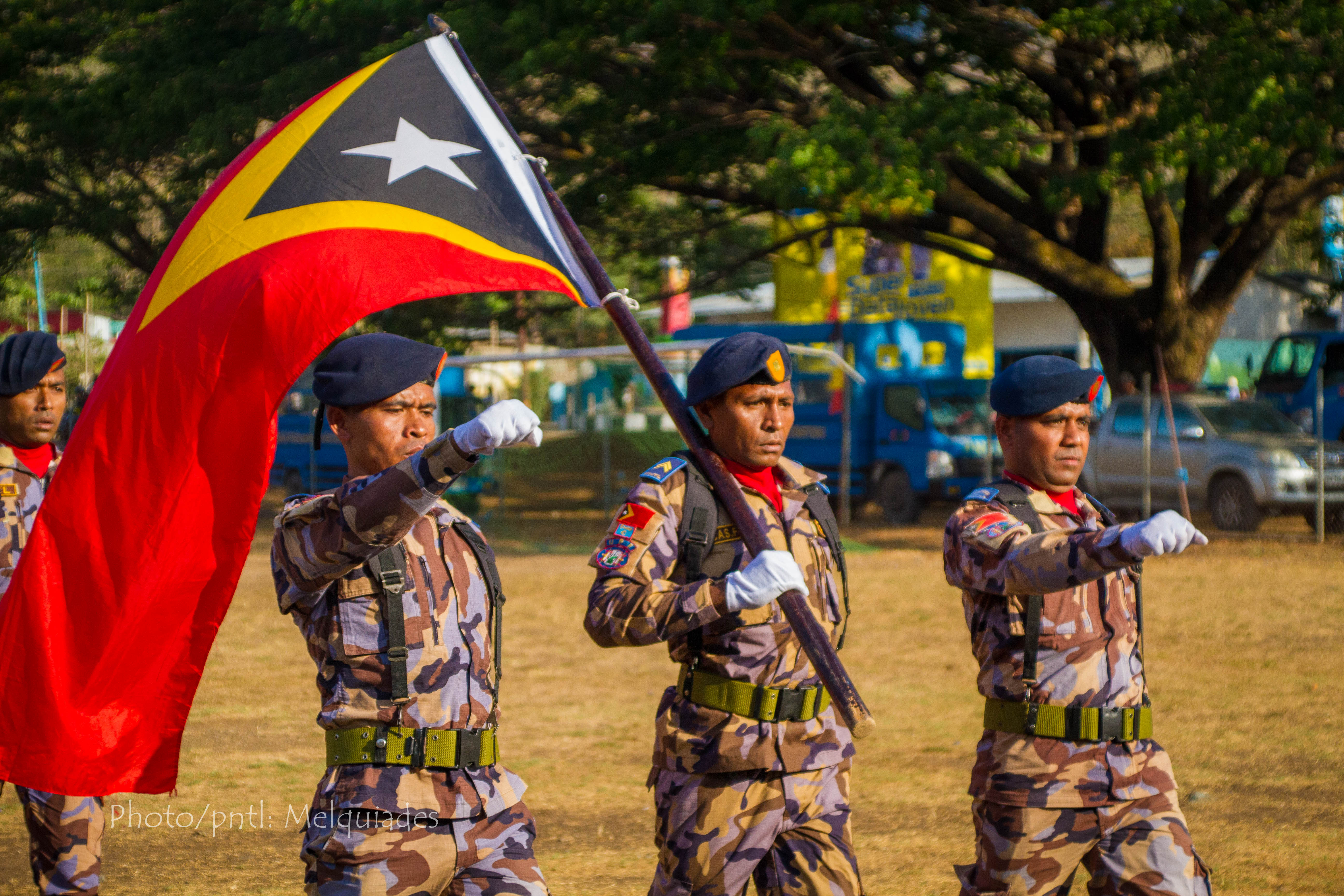 Osttimoresische Grenzpolizei (Unidade da Polícia de Fronteiras UPF)